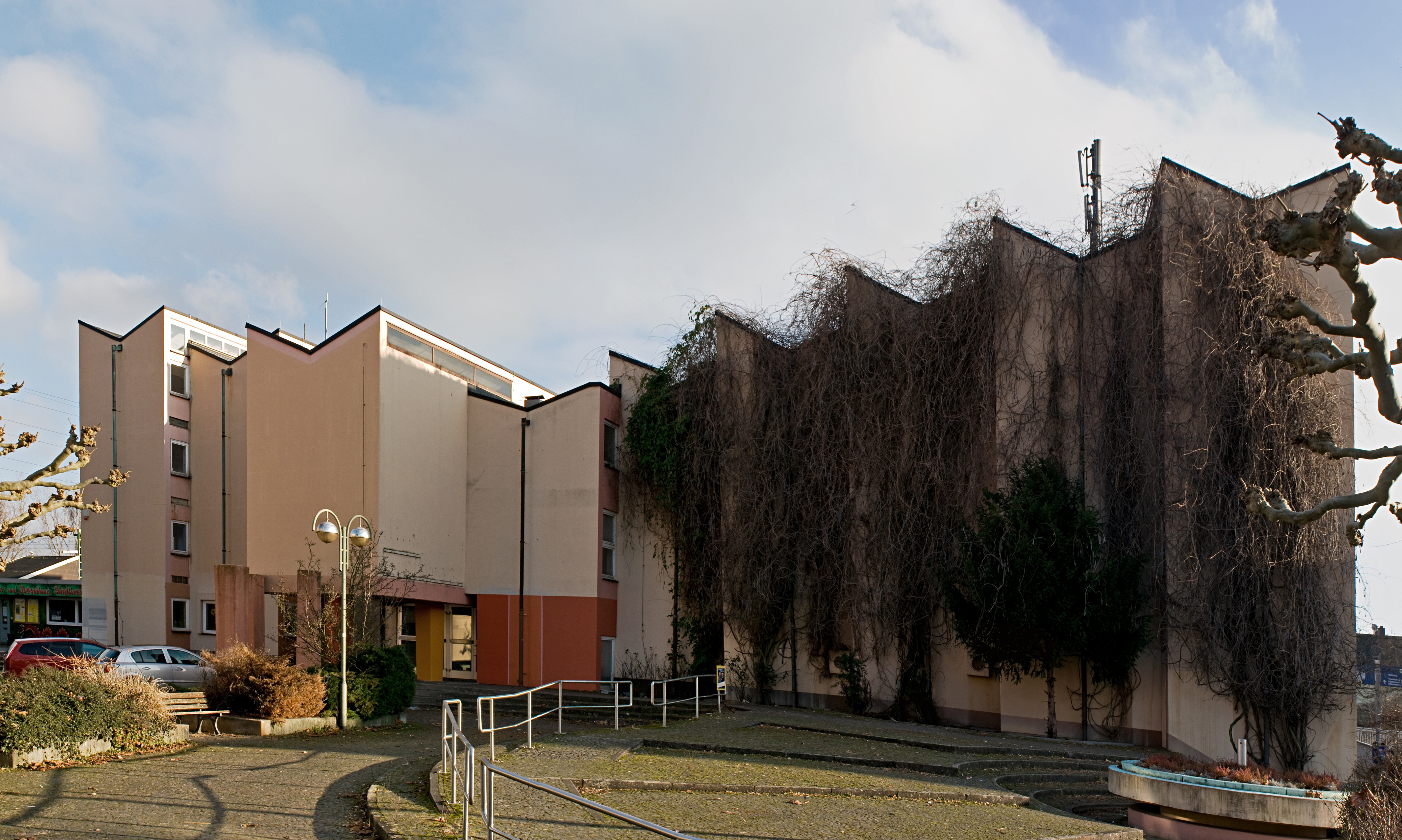 Haus Sindlingen, Nordfassade